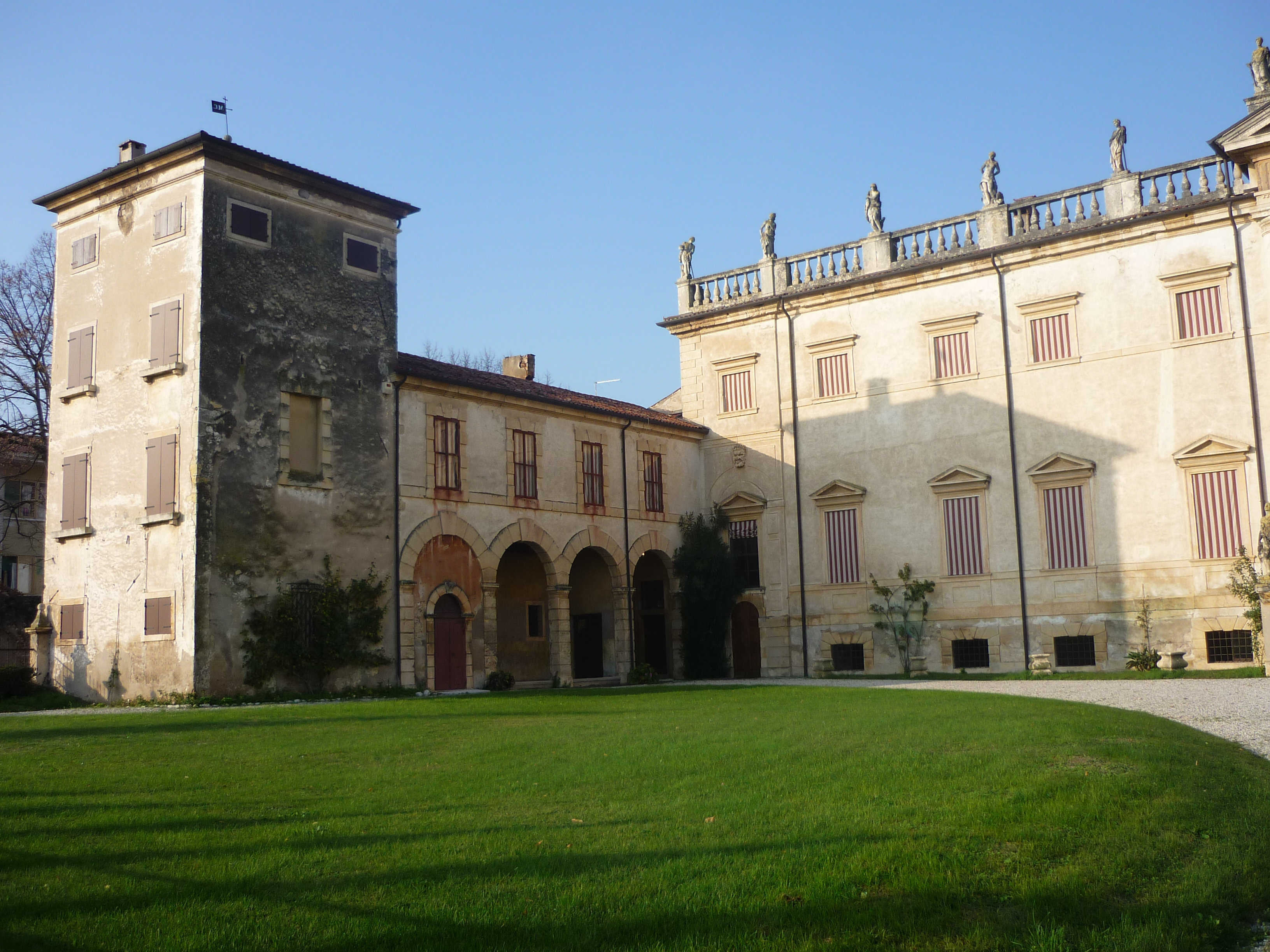 Ala est della villa Pompei-Carlotti di Illasi (Verona, Italy)